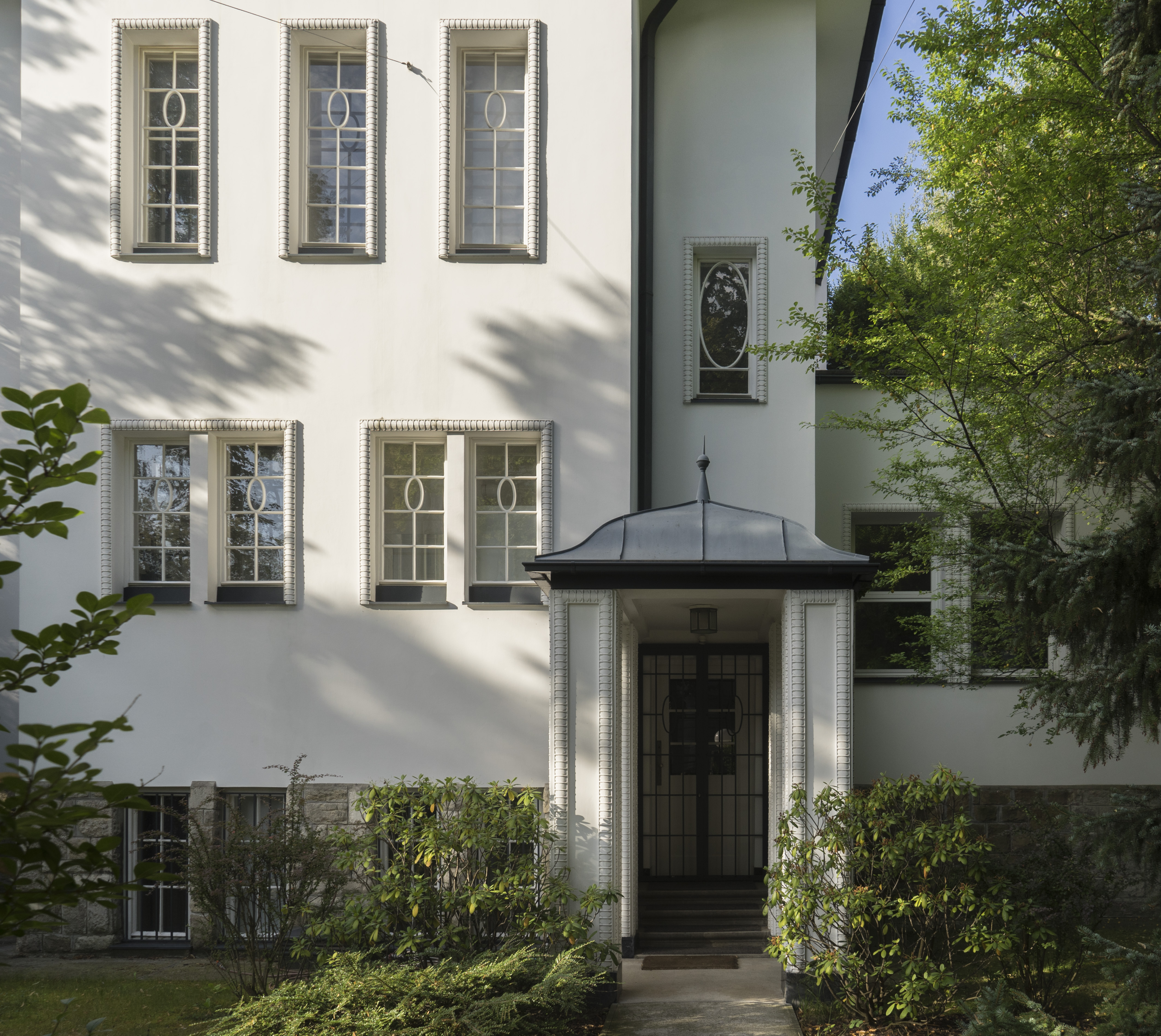 La Roche Gasse 13, Carl Witzmann. Hoffmann-Schule